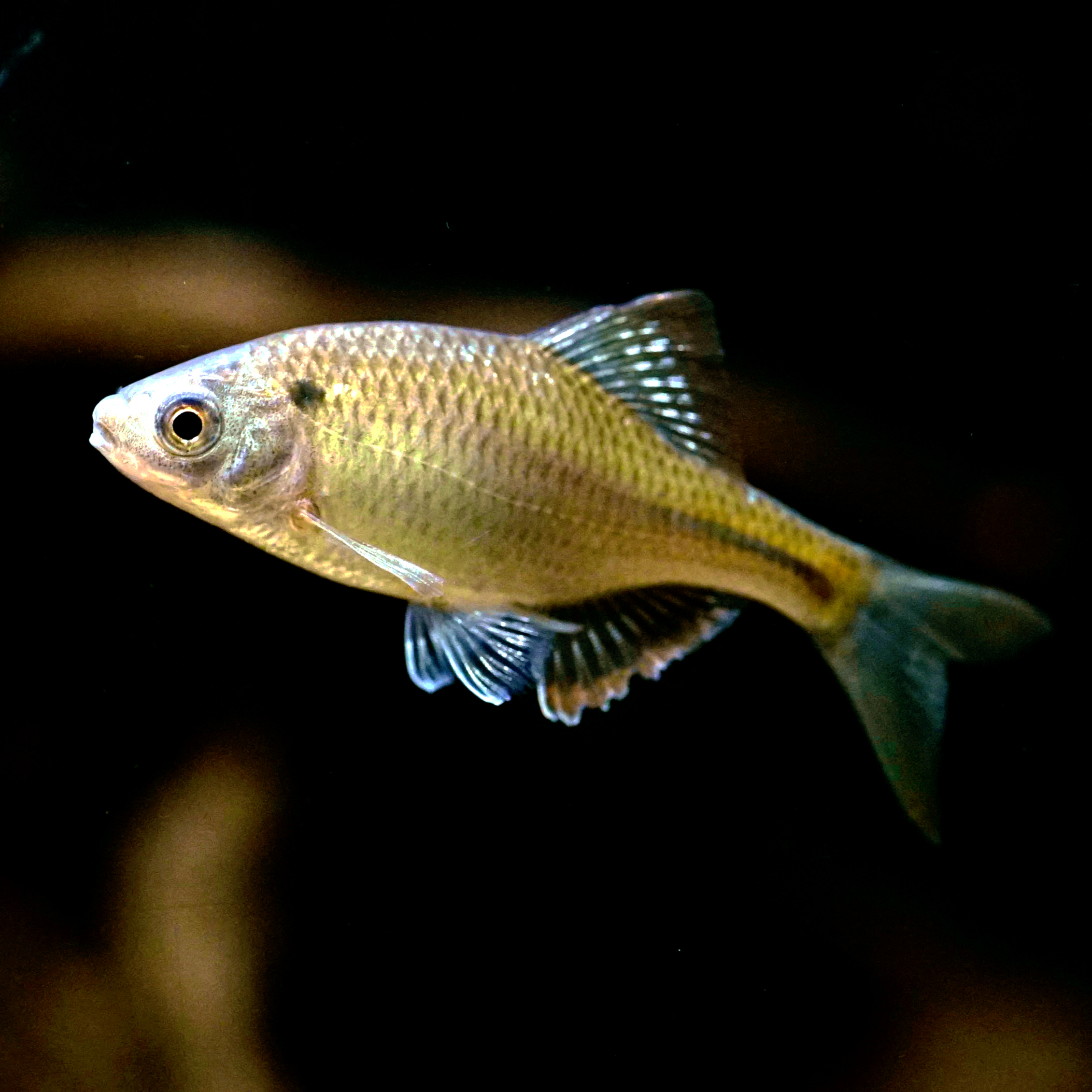 シロヒレタビラ Shirohiretabira Domain: Eukaryota • Regnum: Animalia • Phylum: Chordata • Subphylum: Vertebrata • Infraphylum: Gnathostomata • Superclassis: Osteichthyes • Classis: Actinopterygii • Ordo: Cypriniformes • Familia: Cyprinidae • Genus: Acheilognathus Wikispecies has an entry on: Acheilognathus tabira tabira. Species Acheilognathus tabira tabira (Jordan and Tompson, 1914) 動物界 脊索動物門 条鰭綱 コイ目 コイ科 タナゴ属 Other photos: NCBI Taxonomy ID:80787 uBio search link: Acheilognathus tabira tabira